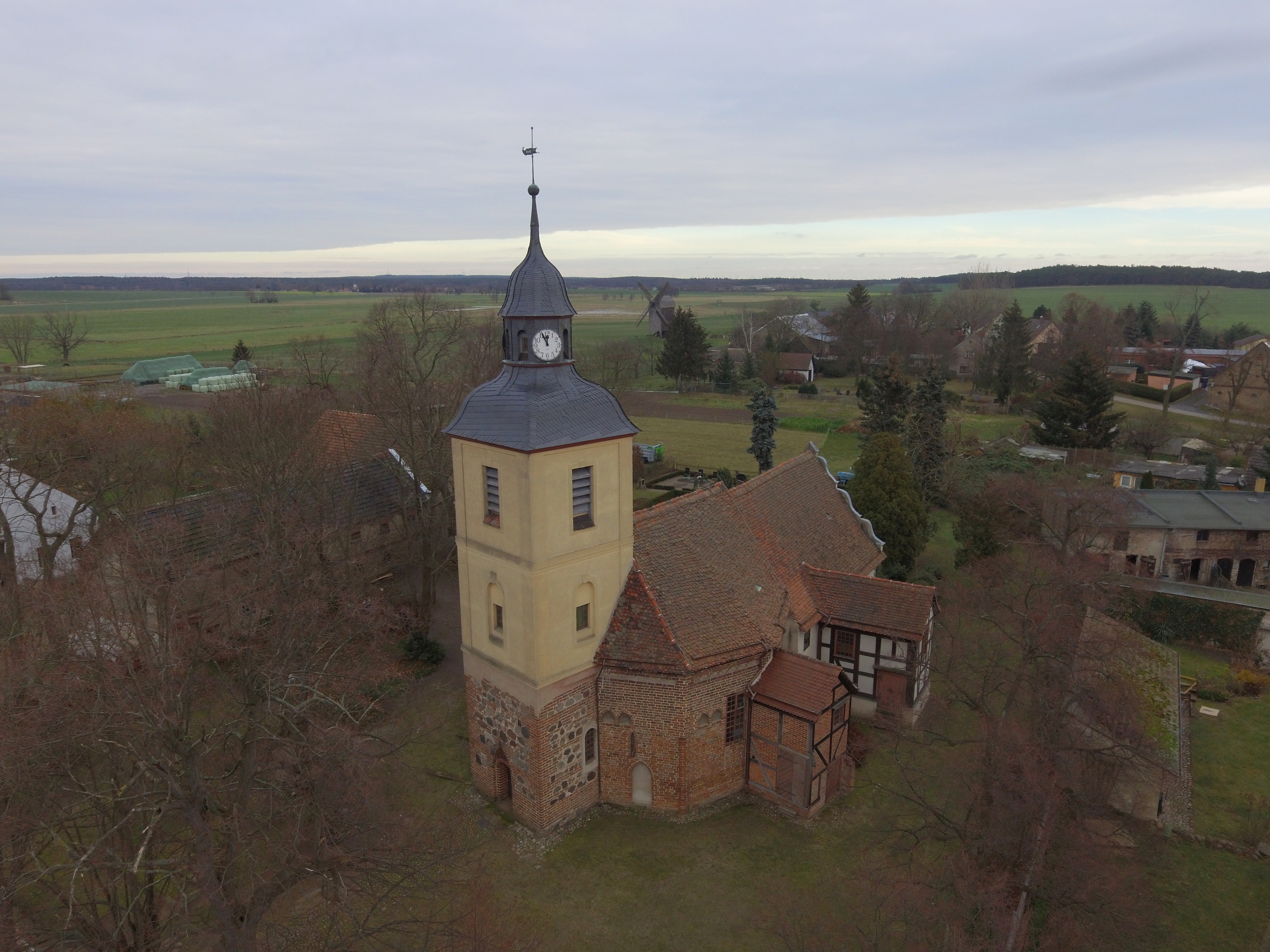 Luftbild Kirche Ketzür